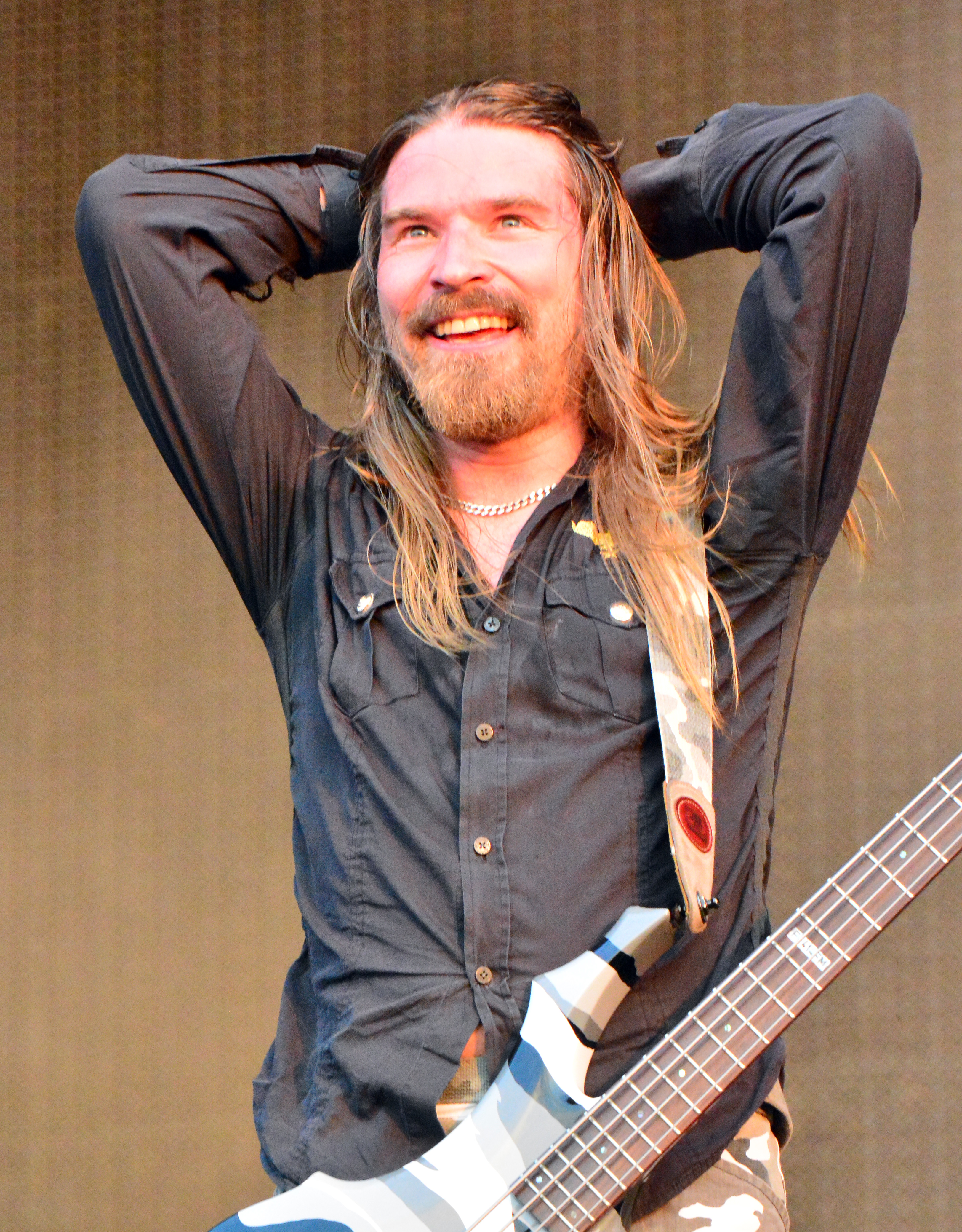 Sabaton beim Wacken Open Air 2015